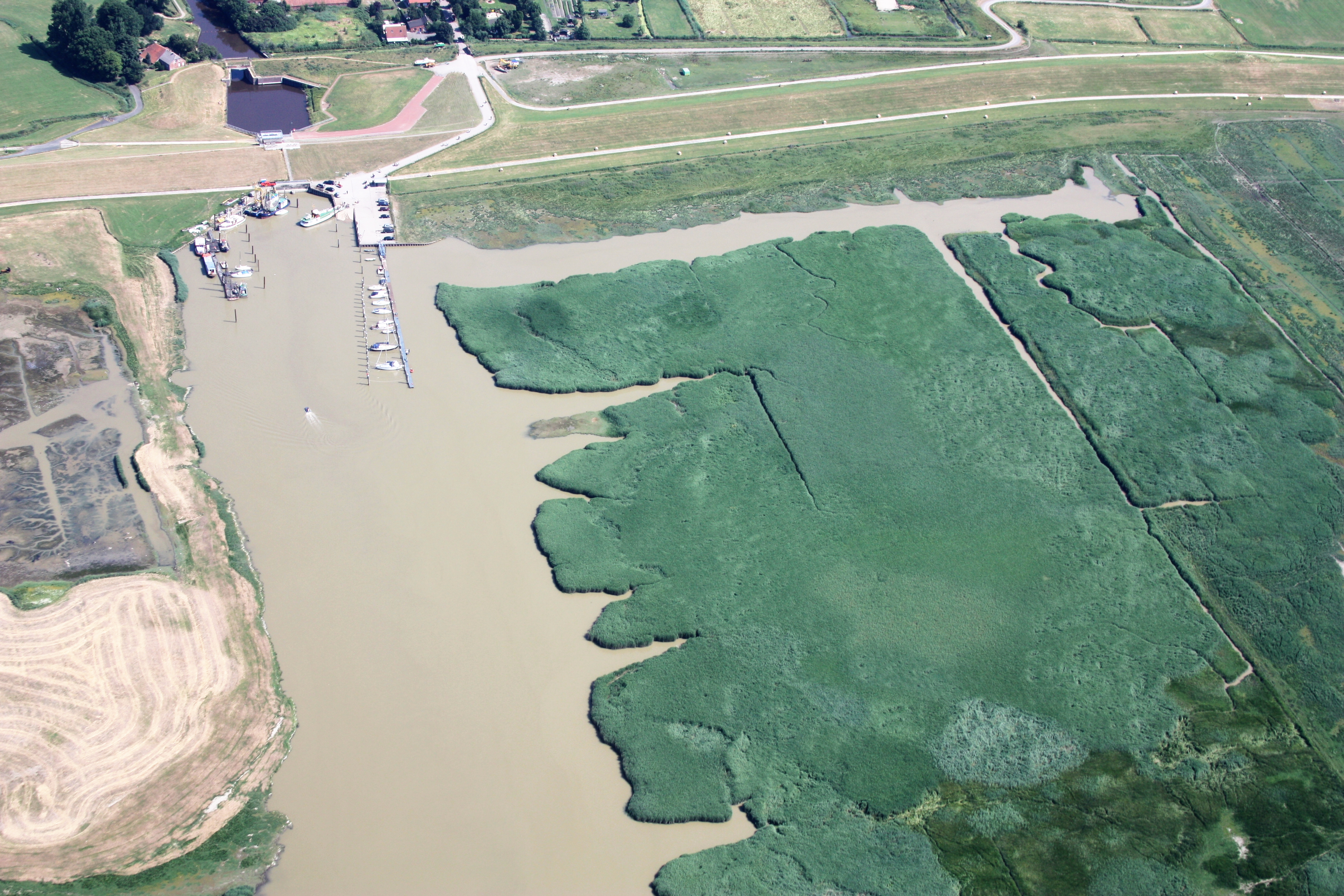 Luftaufnahme; Flug von Leer nach Emden; Flughöhe 1500 ft; Juli 2010; Originalfoto bearbeitet: Tonwertkorrektur und Bild geschärft mit Hochpassfilter Hafen Petkum und Naturschutzgebiet „Petkumer Deichvorland“ in Emden